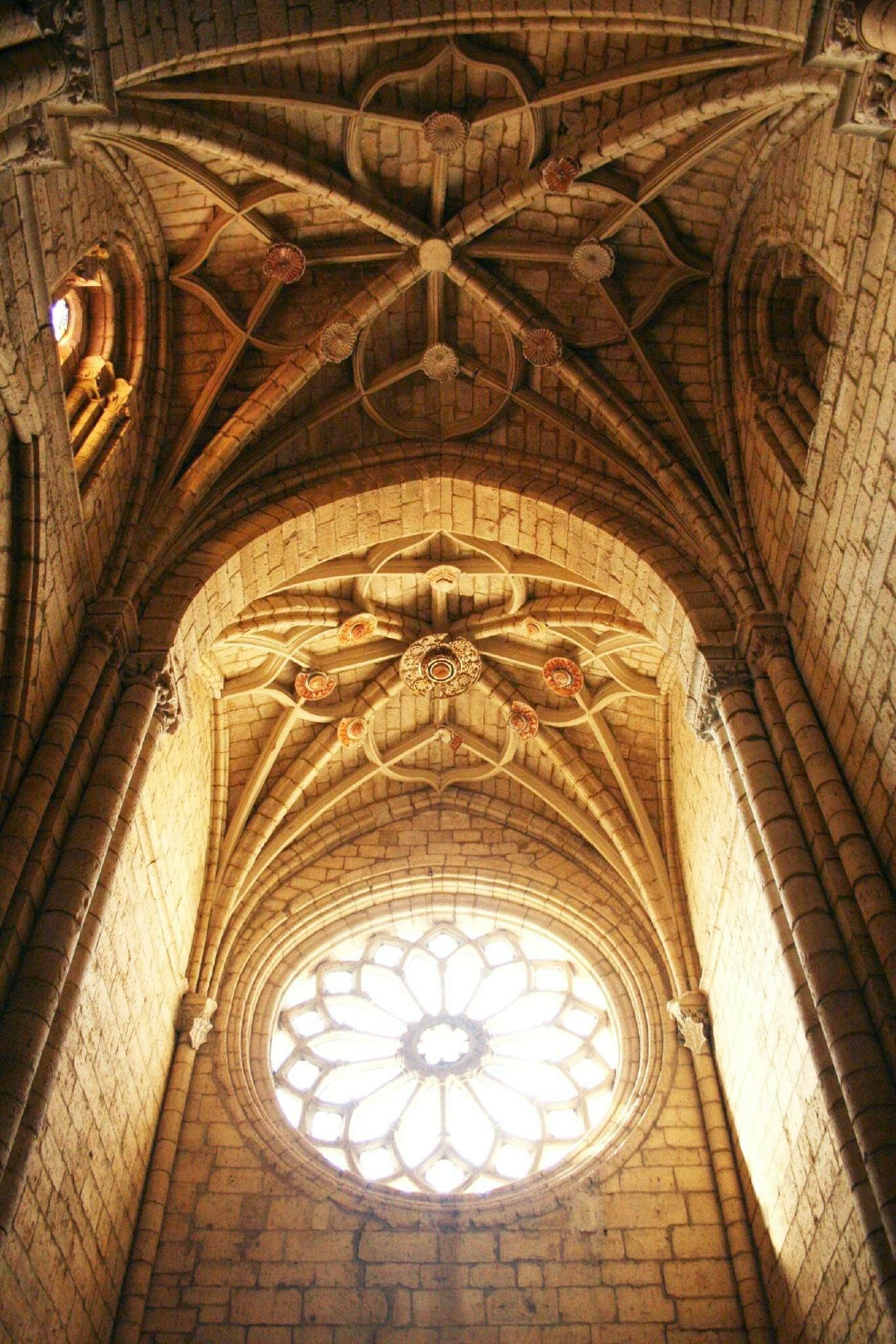 Cubiertas y rosetón de la Capilla de Santiago, en la Iglesia de Santa María la Blanca, Villalcázar de Sirga, Palencia, España